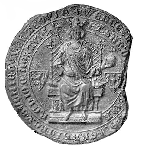 Wacław II Czeski